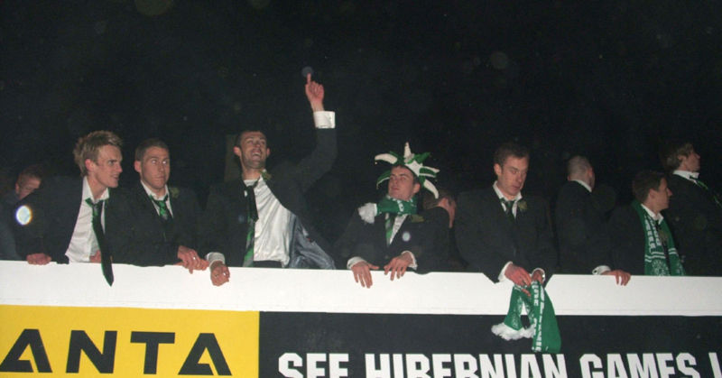 Photo taken by Guinnog